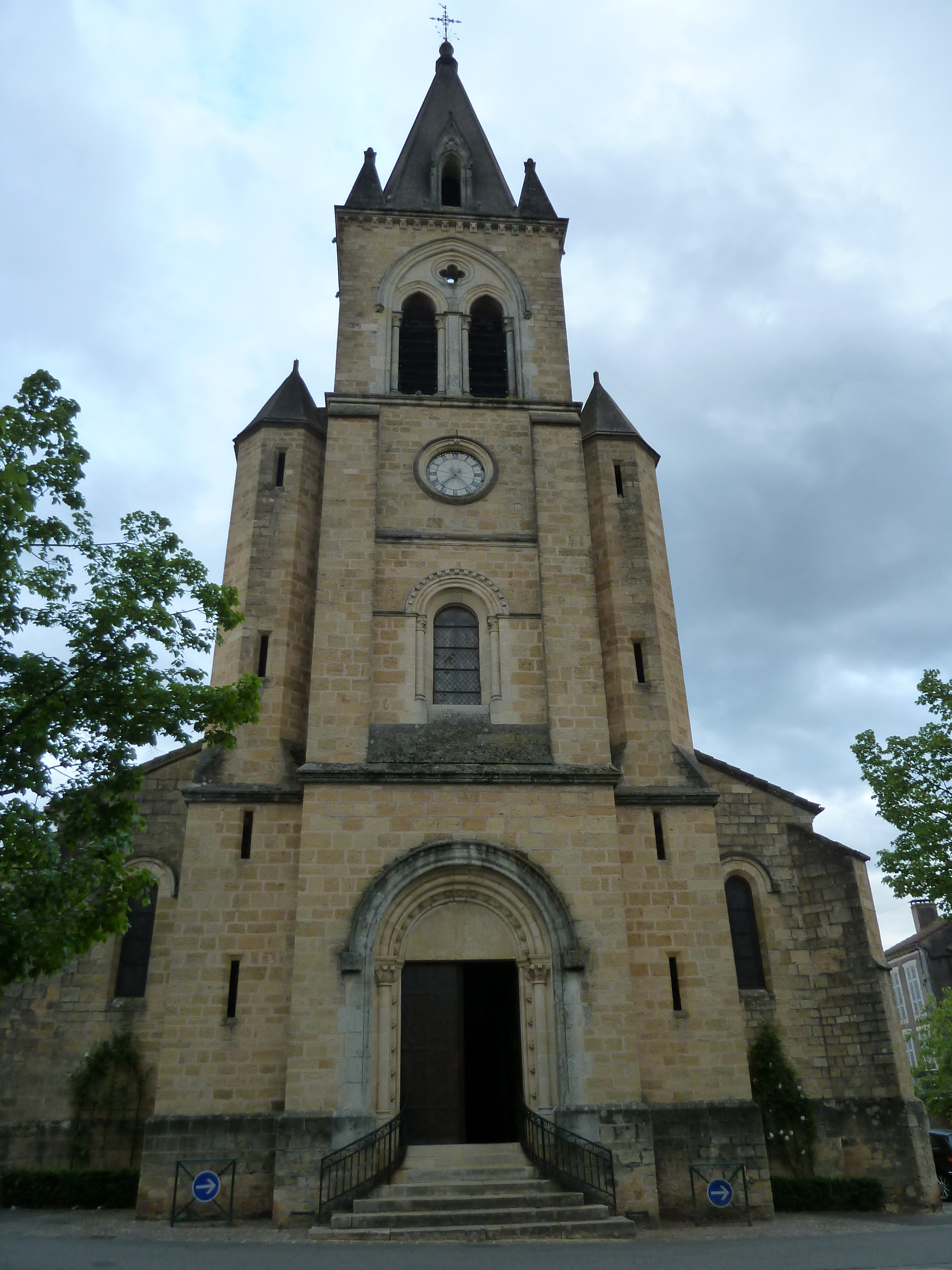 Église Saint-Barthélemy de Prayssac construite en 1861